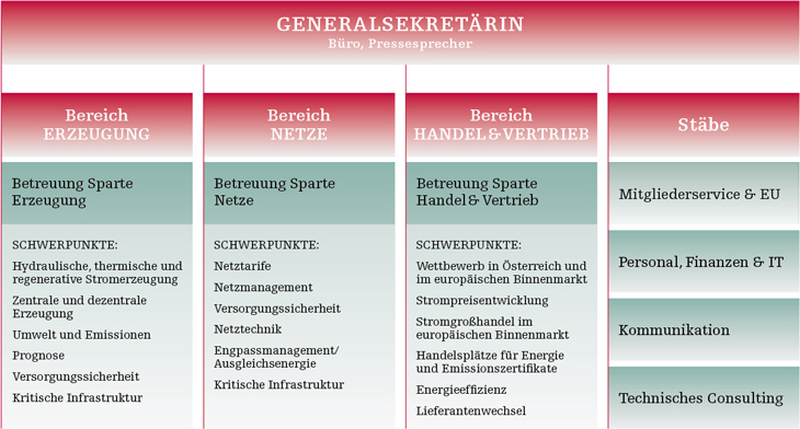 Organisationsstruktur und Ansprechpartner Österreichs Energie